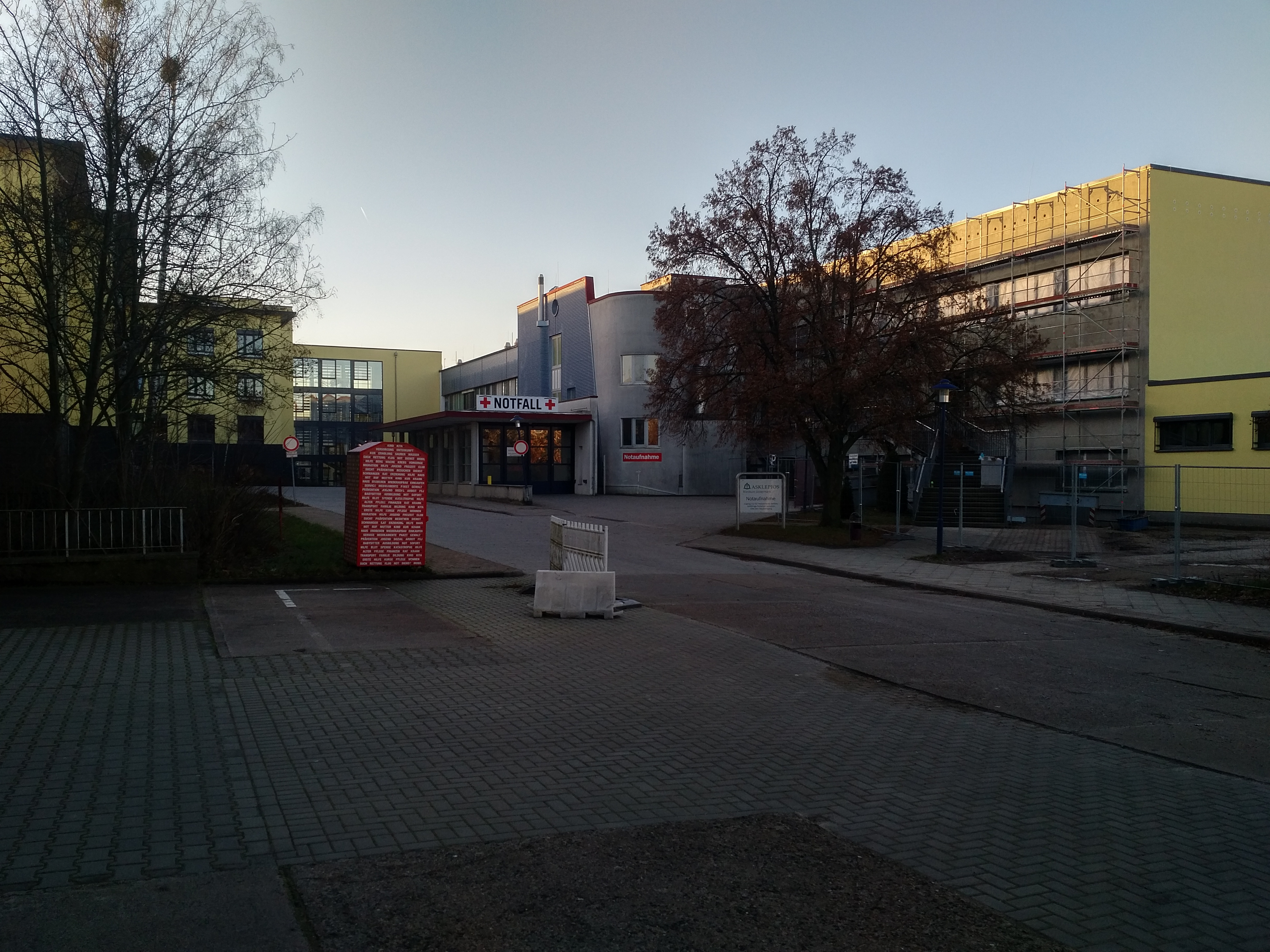 Asklepios Klinikum Uckermark, Schwedt/Oder: Zugang zur Notaufnahme, Ansicht von Norden